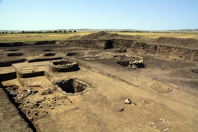 დიდნაურის ნაქალაქარი